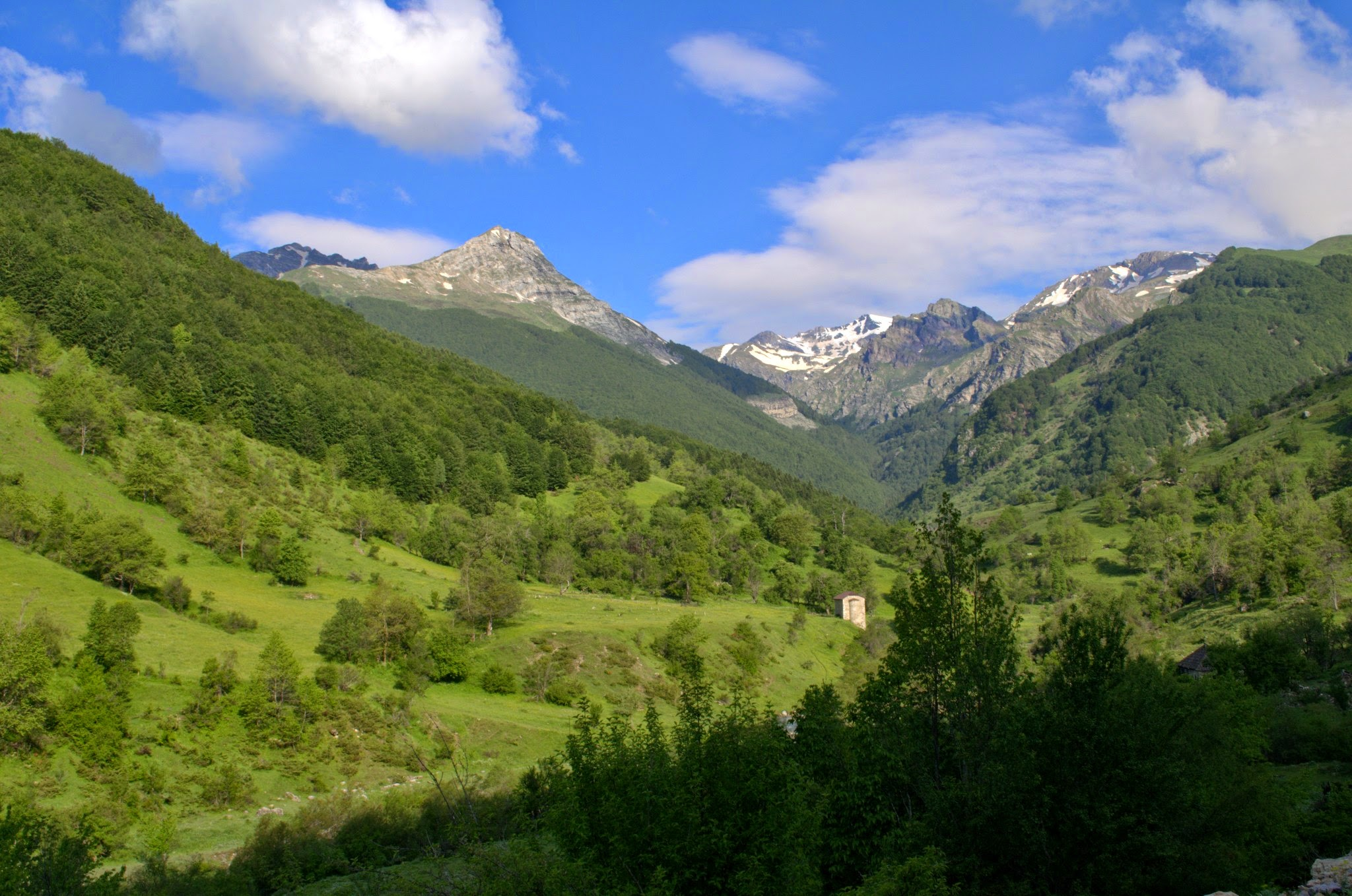 Црквата Св. Варвара во планинското село Жужње со врвовите Рибничка Скала и Кабаш, планина Кораб, дел од Национален парк Маврово